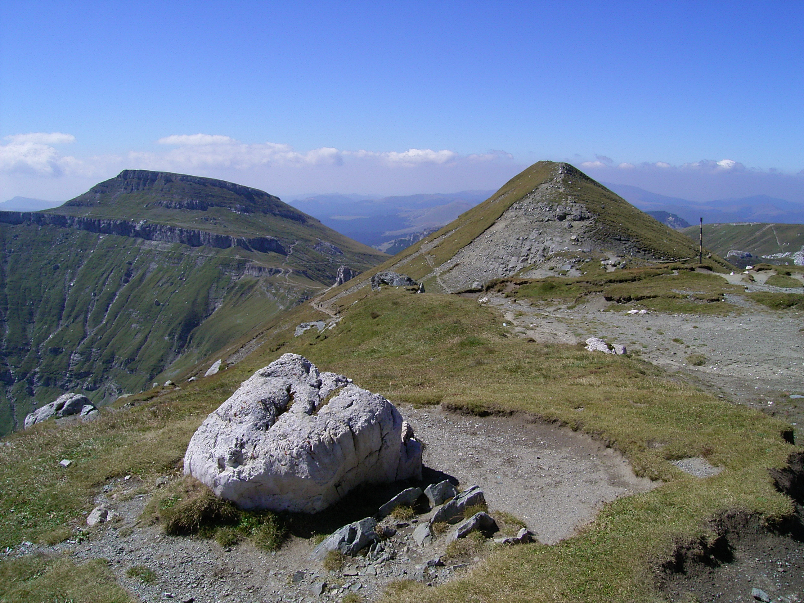 vârful Bucura Dumbravă (dreapta) și vârful Colțul Obârșiei (stânga)